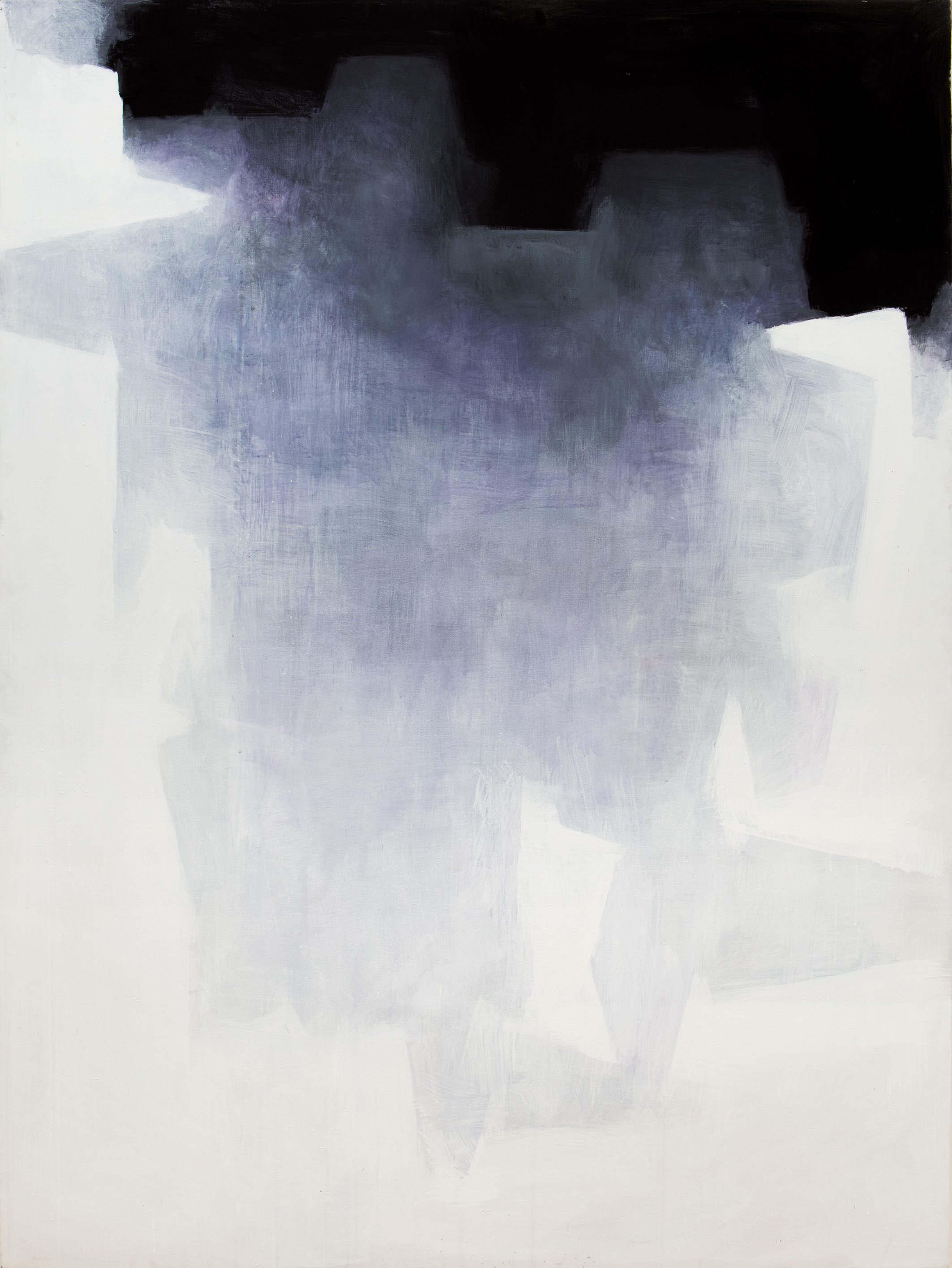 Gemälde von Walter Vopava, ohne Titel, 2017, 200x150cm